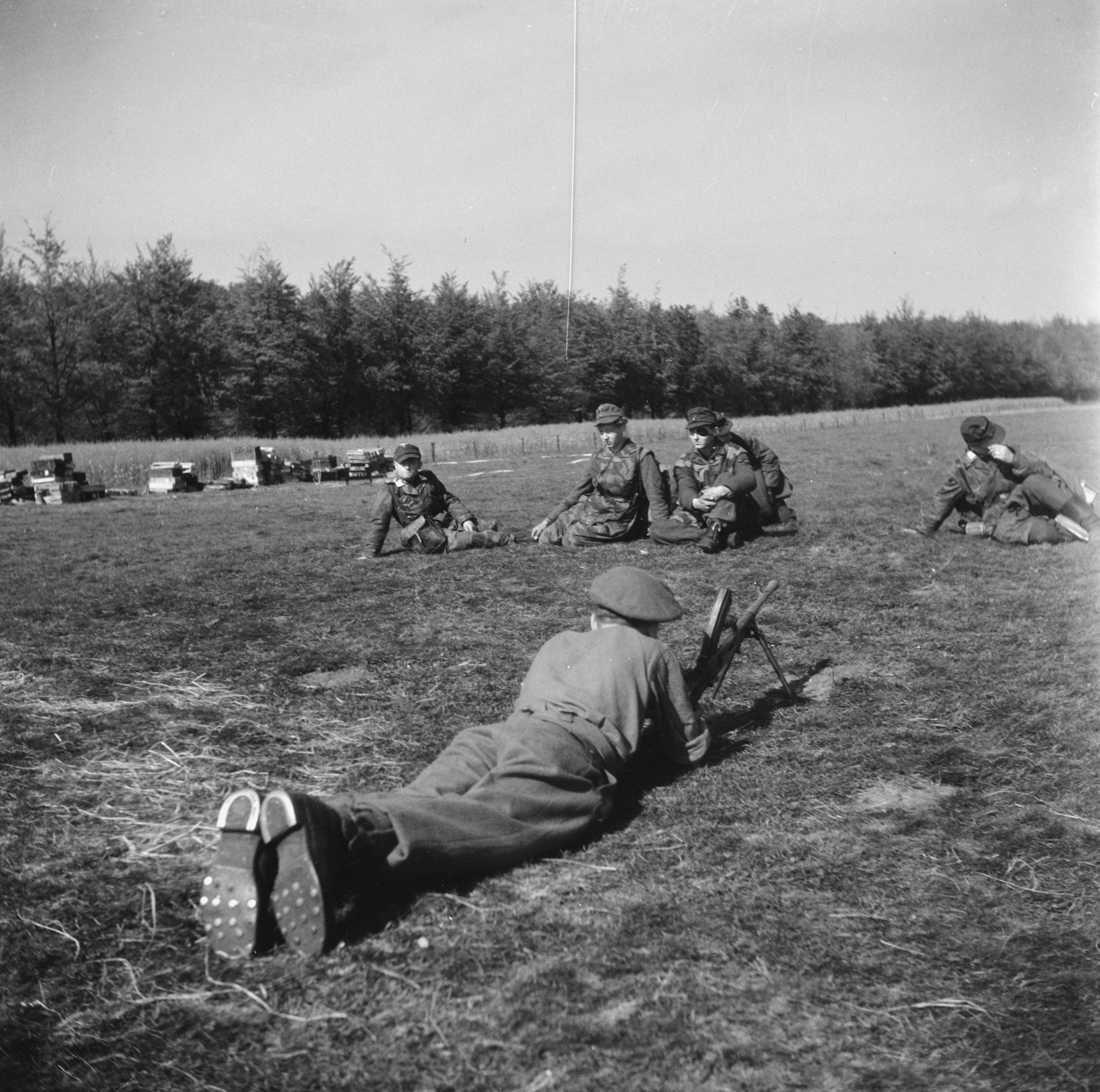 Collectie / Archief : Fotocollectie Anefo Reportage / Serie : Capitulatie: Soest Beschrijving : Inleveren van wapens door de Duitsers. Het wapendepot in Soest, waar de Duitsers hun wapens moeten inleveren. Een Britse militair met bren houdt Duitse krijgsgevangen onder schot Annotatie : Luftwaffe militairen, waarschijnlijk van de 6 Fallschirmjäger Division Datum : 10 mei 1945 Locatie : Soest, Utrecht (provincie) Trefwoorden : militairen, wapens Fotograaf : Poll, Willem van de / Anefo Auteursrechthebbende : Nationaal Archief Materiaalsoort : Negatief (zwart/wit) Nummer archiefinventaris : bekijk toegang 2.24.01.03 Bestanddeelnummer : 900-3062